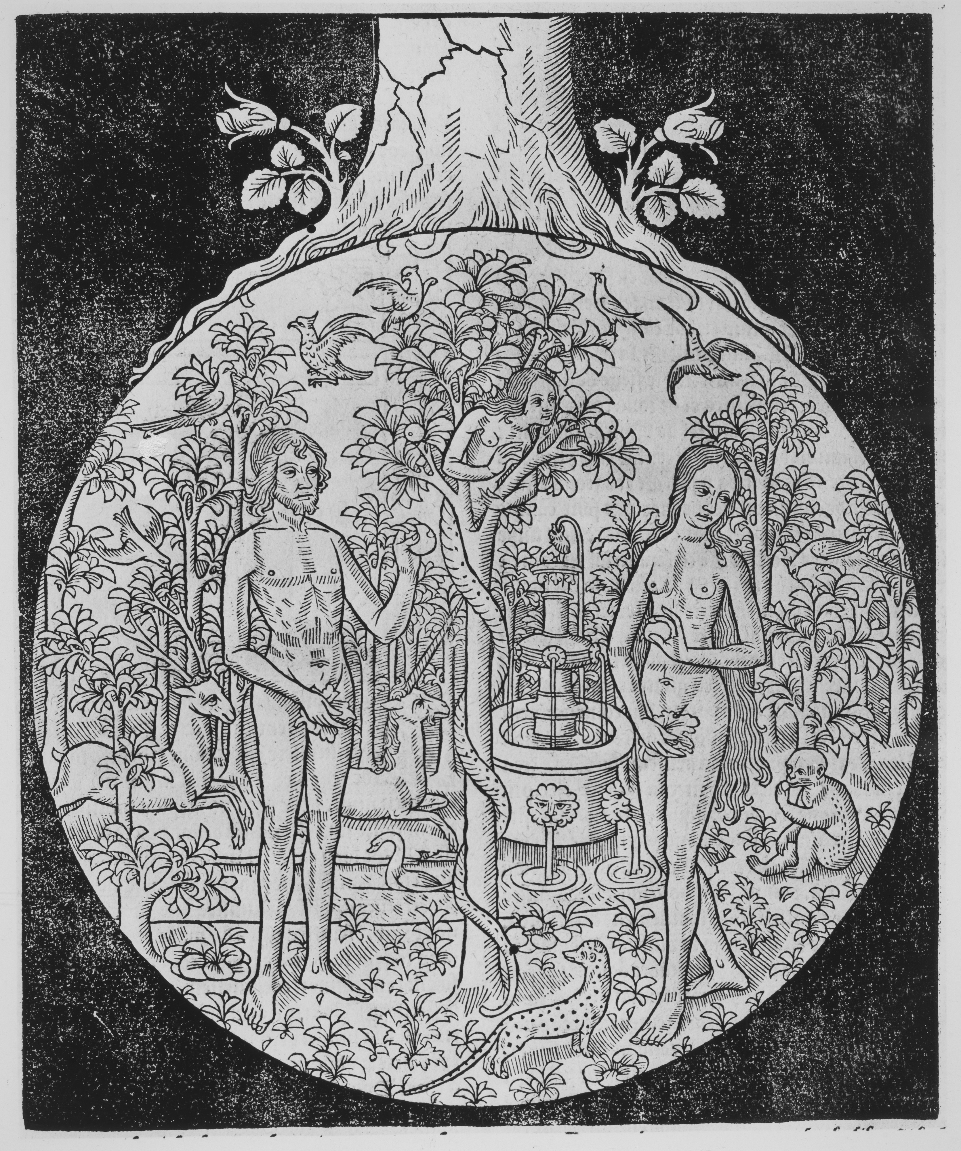 Book; Books